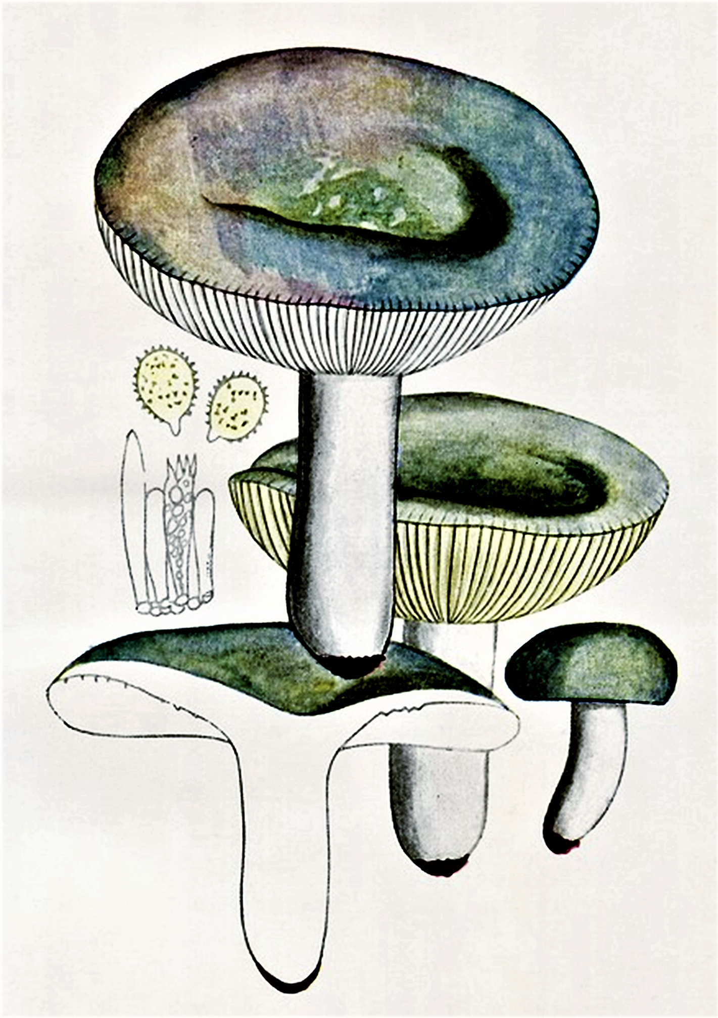 Giacomo Bresadola: Russula grisea (Christian Hendrik Persoon|Pers., 1801) Fr. (1838)